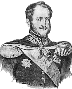 Mihail Sturdza